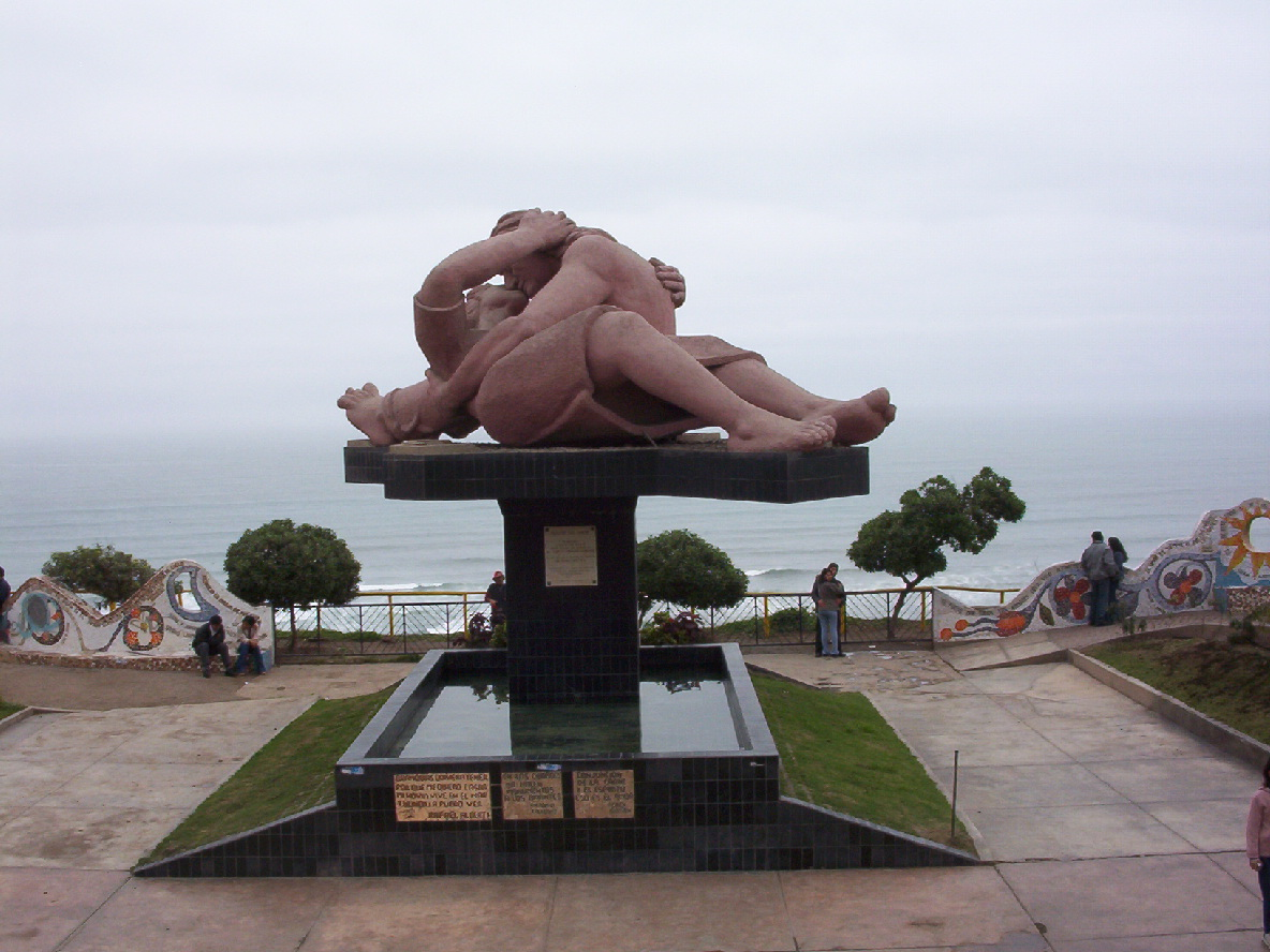 Lima, Die Liebenden